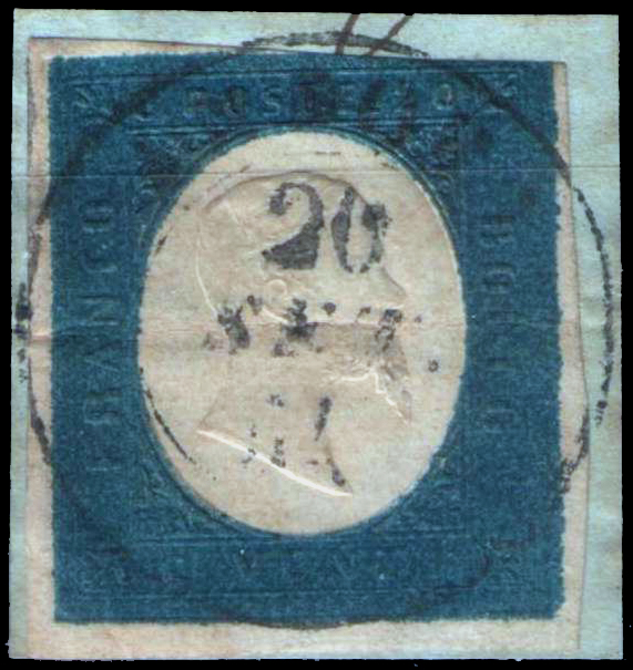 Почтовая марка Сардинского королевства из третьего выпуска